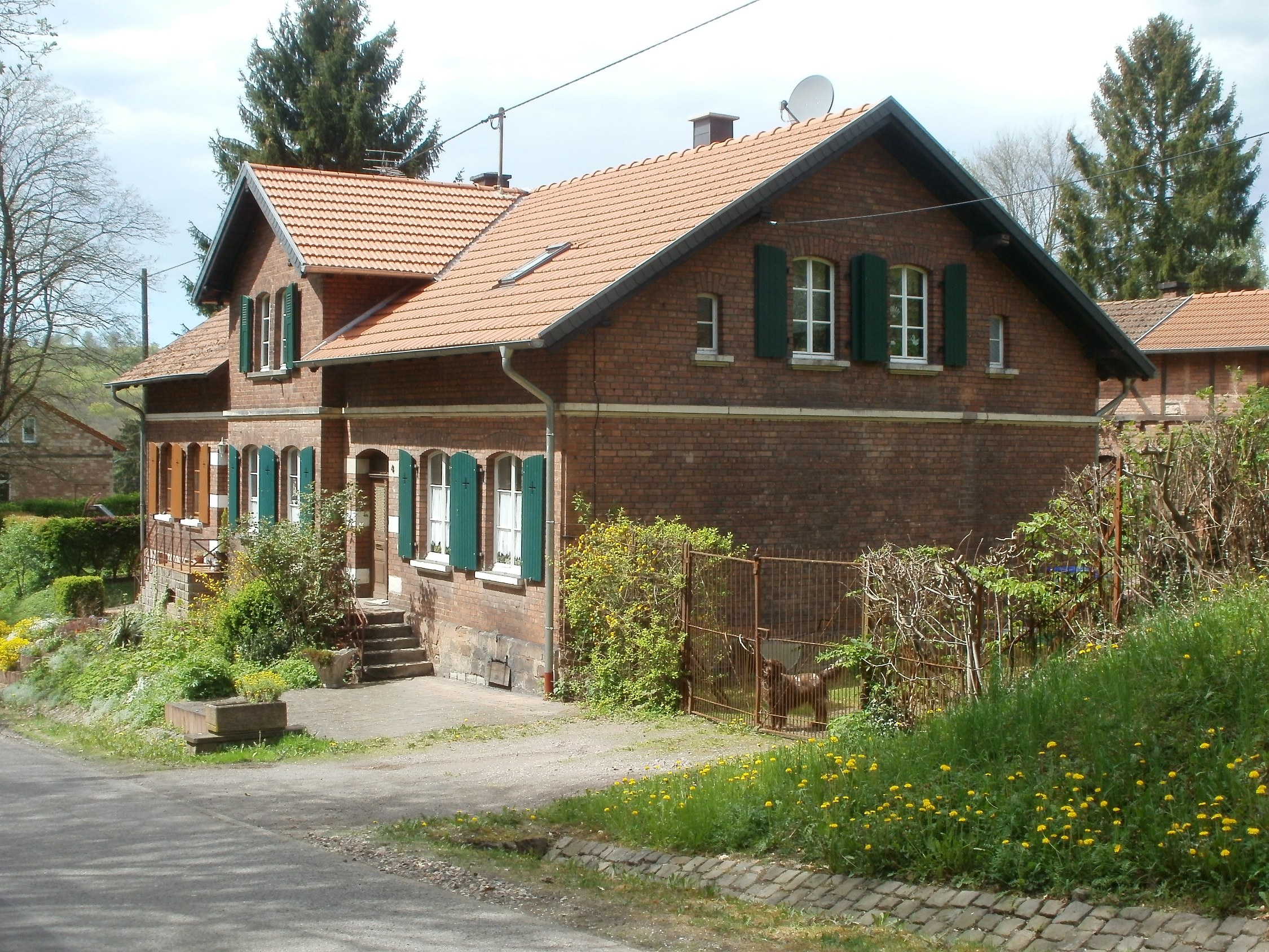 Grubensiedlung Von der Heydt (Saarbrücken)